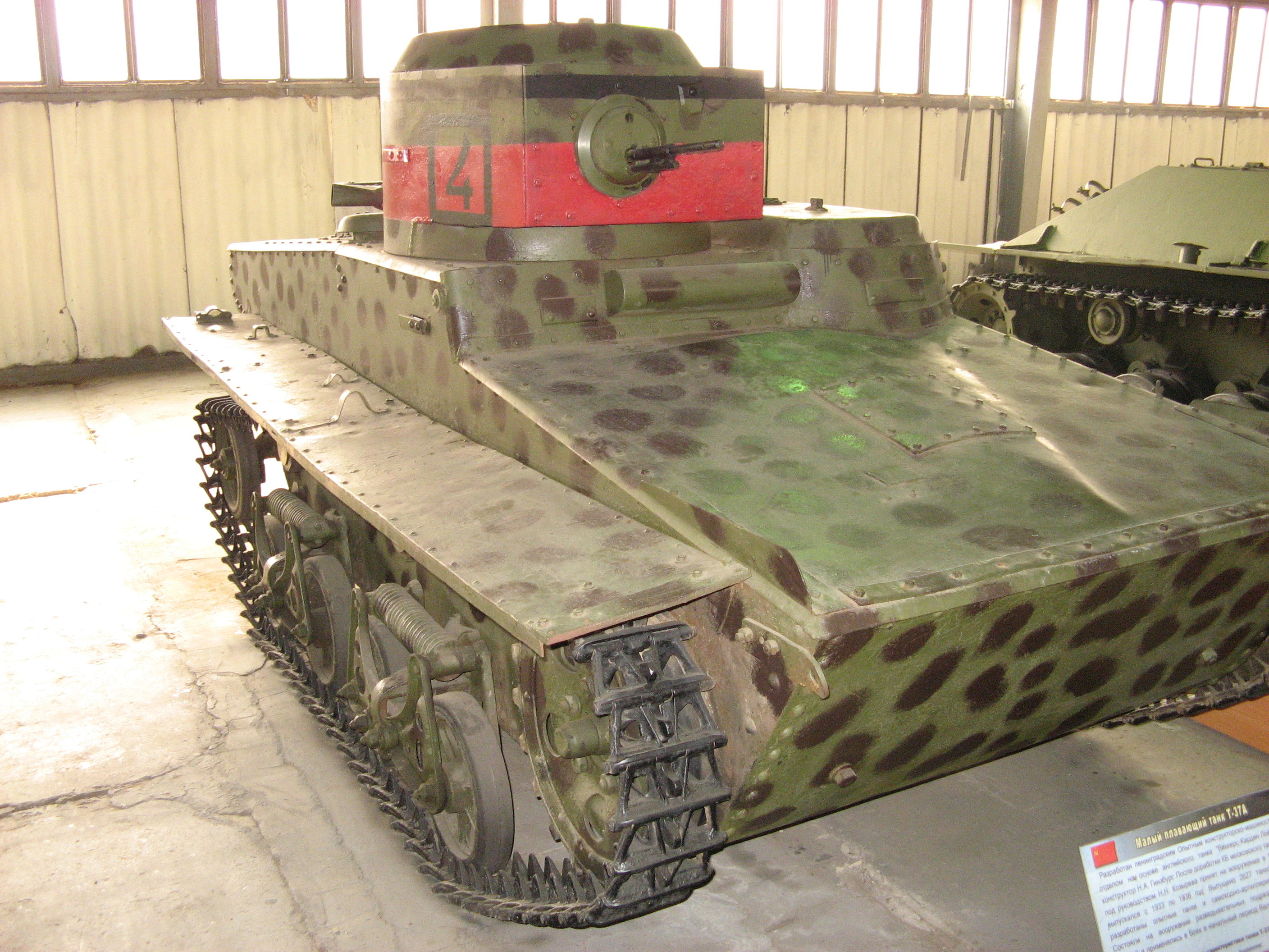 Kubinka. tank museum russia